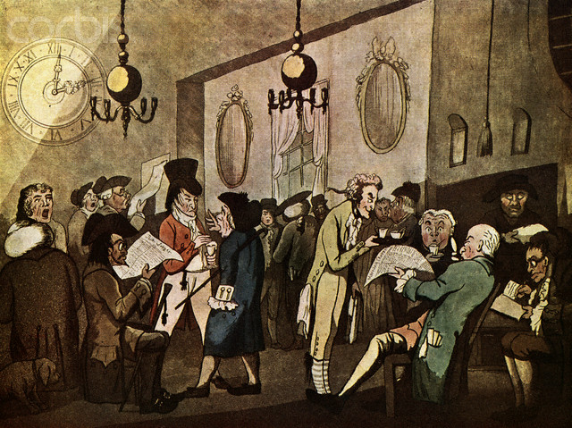 Edward Lloyd's Coffee house, à Londres, par William Holland (1789)[1]. Commerce de café où le journal anglais Lloyd's List fut à l'origine publié au 18e siècle.